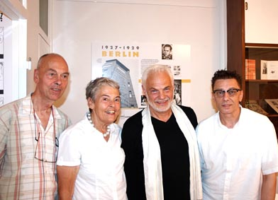 Sohn und Tochter des Künstlers Walter Wenger, sowie Galerist Wittus Witt und Designer Peter Busch